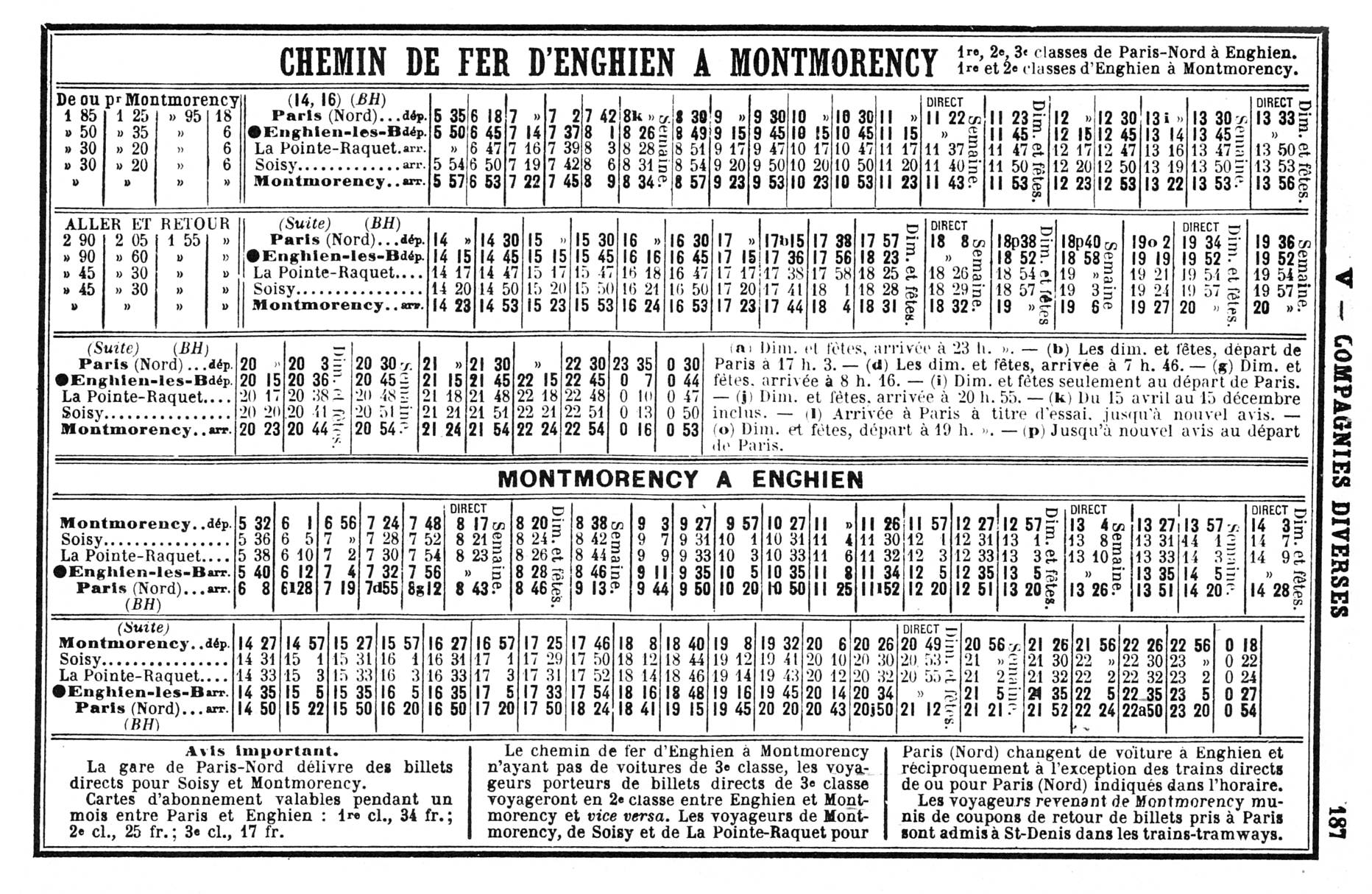 Tableau horaire de la ligne Enghien - Montmorency Ligne dite du (Le Refoulons) Réseau du Nord - Compagnies diverses